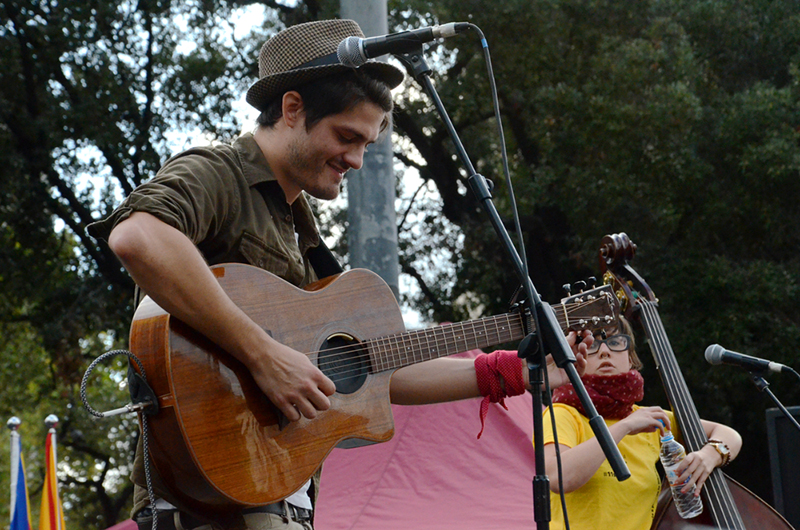 Concert d'Els Catarres. La Via Catalana a Barcelona. Plaça Catalunya.